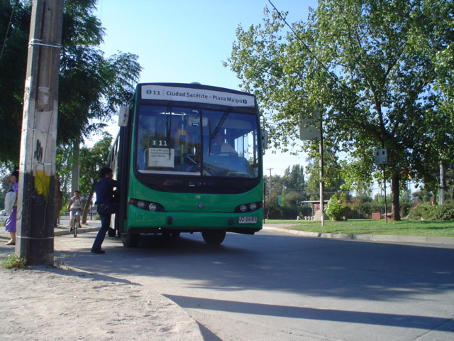 Bus alimentador I11